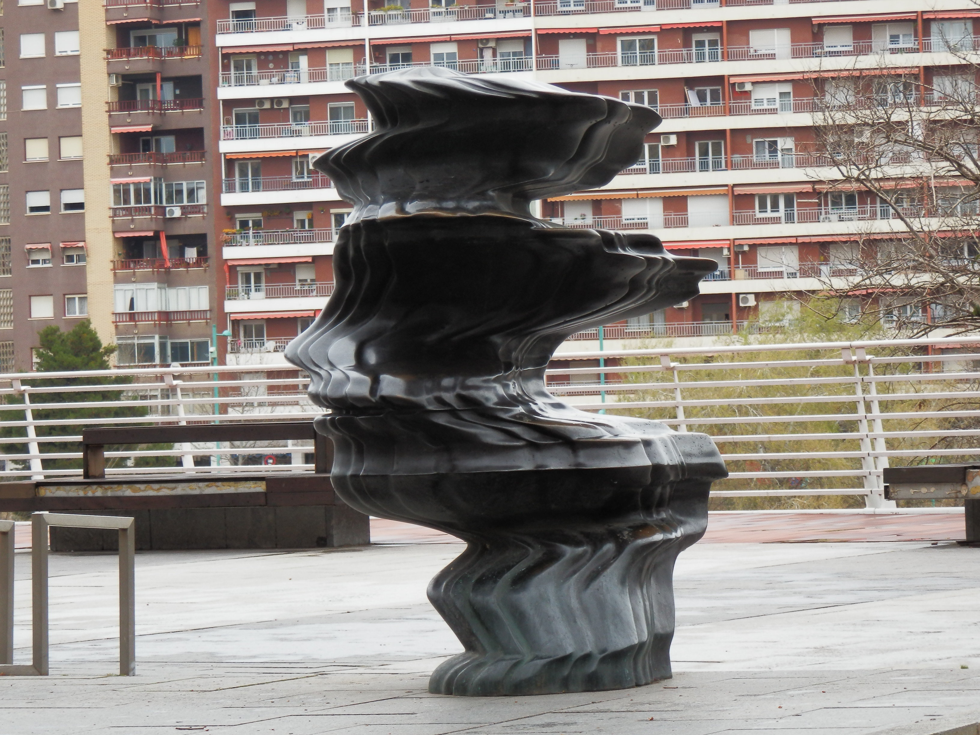 Escultura Wild Relative de Tony Cragg en Zaragoza.